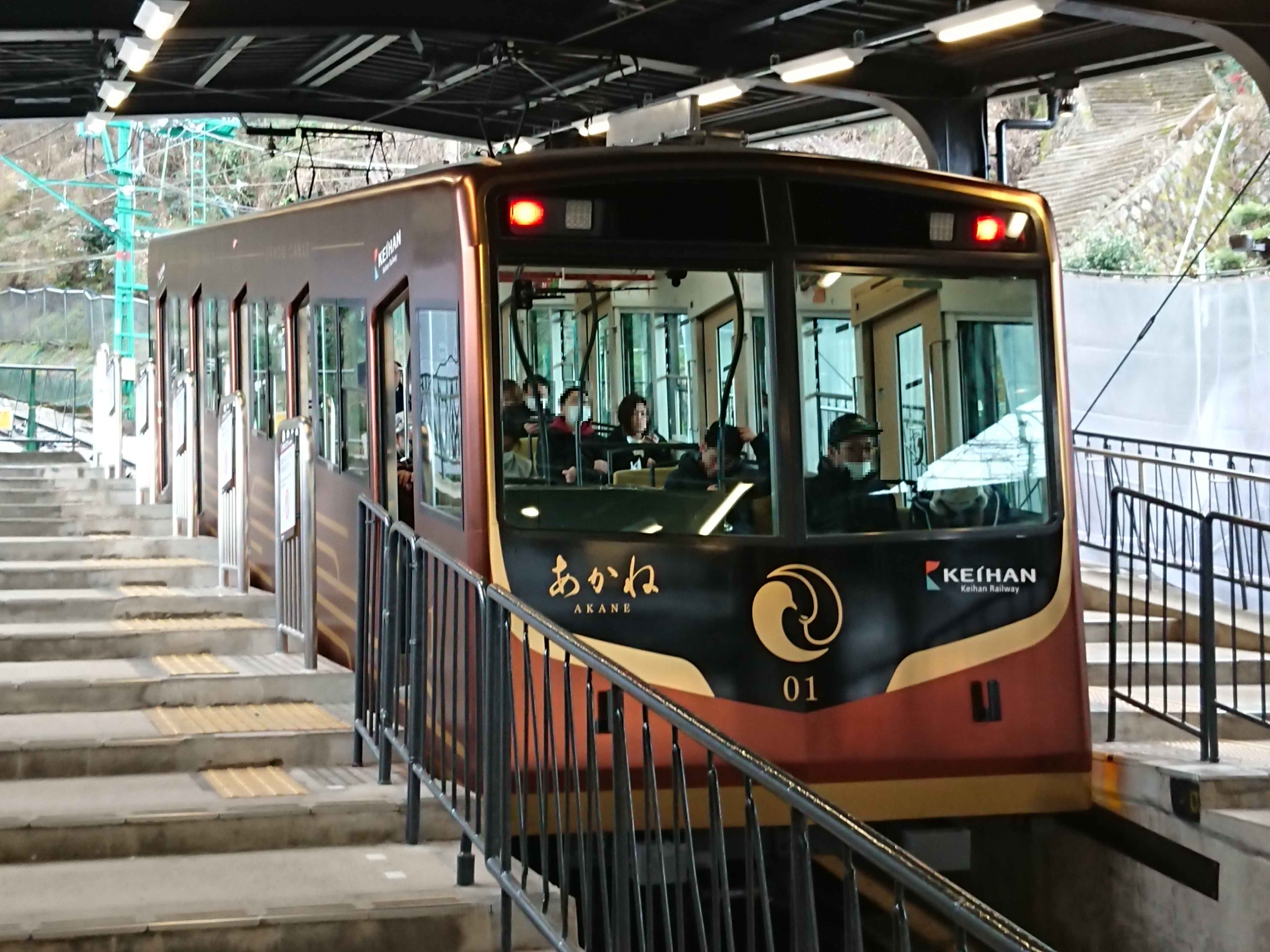 京阪鋼索線(石清水八幡宮参道ケーブル)の客車「あかね」 ケーブル八幡宮口駅にて撮影（京都府八幡市）